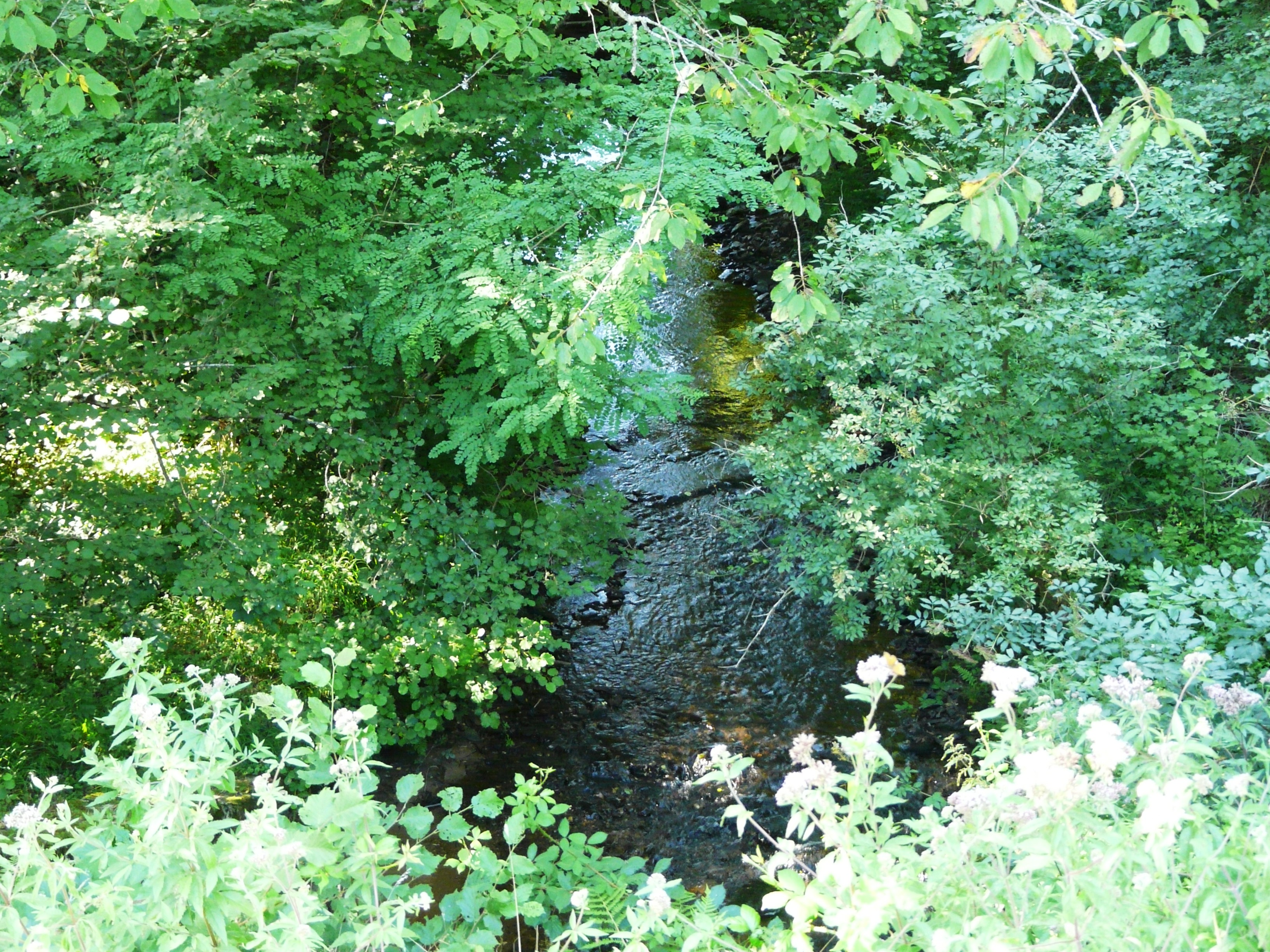 Ruisseau le Touroulet en amont du pont de la route départementale 77 près du lieu-dit Javanaud, Saint-Jory-de-Chalais, Dordogne, France